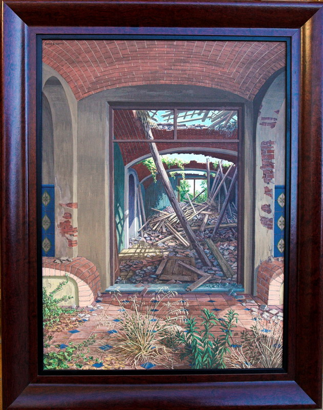 Ruines de la masia de Can Camp. Pintura de Josep Comes i Busquets